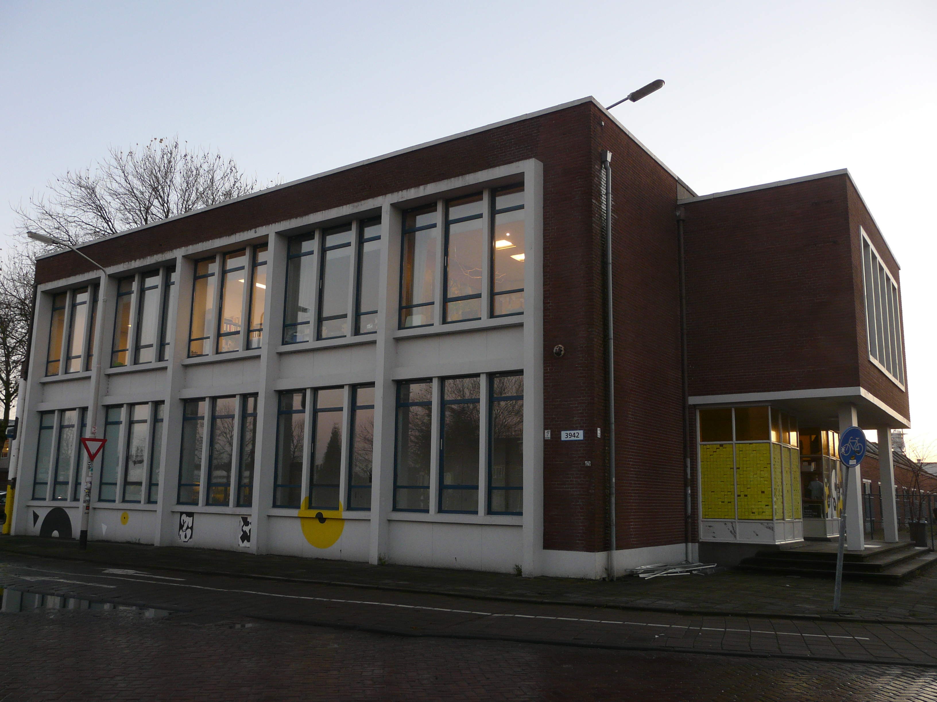 Kunstreactor Electron, Speelhuislaan, in wijk Belcrum in Breda Noord in Breda